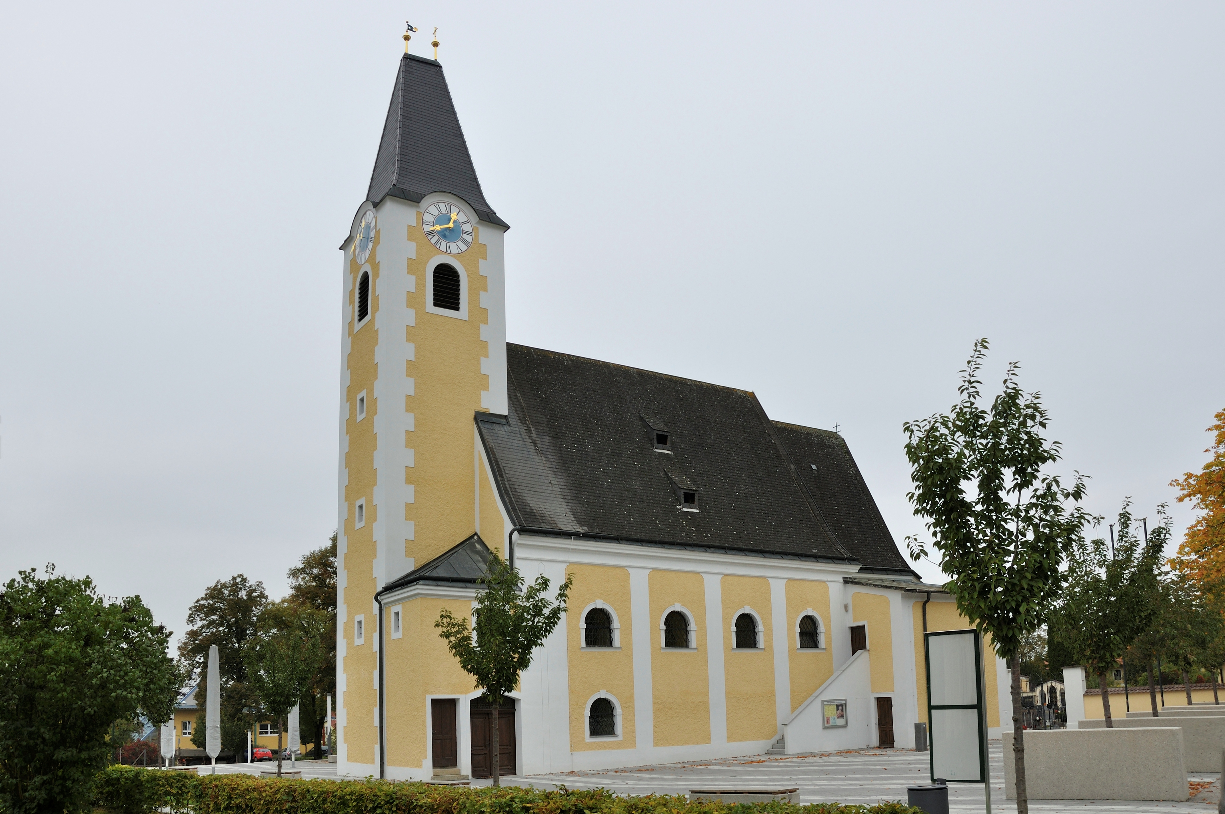 Kath. Pfarrkirche hl. Maria auf der Flucht nach Ägypten